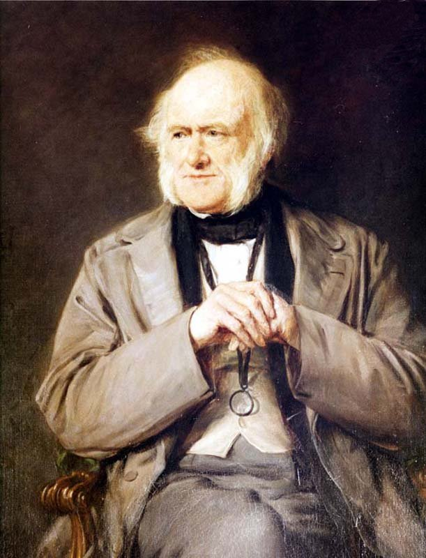 sujet: Charles Lyell licence